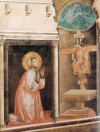 Bildausschnitt in Thumbnail-Größe aus dem Bild "Giotto - Legend of St Francis - -04- - Miracle of the Crucifix.jpg", welches ein Gemälde Giottos wiedergibt. Part and thumbnail from wikicommons "Giotto - Legend of St Francis - -04- - Miracle of the Crucifix.jpg", which is a painting from Giotto.